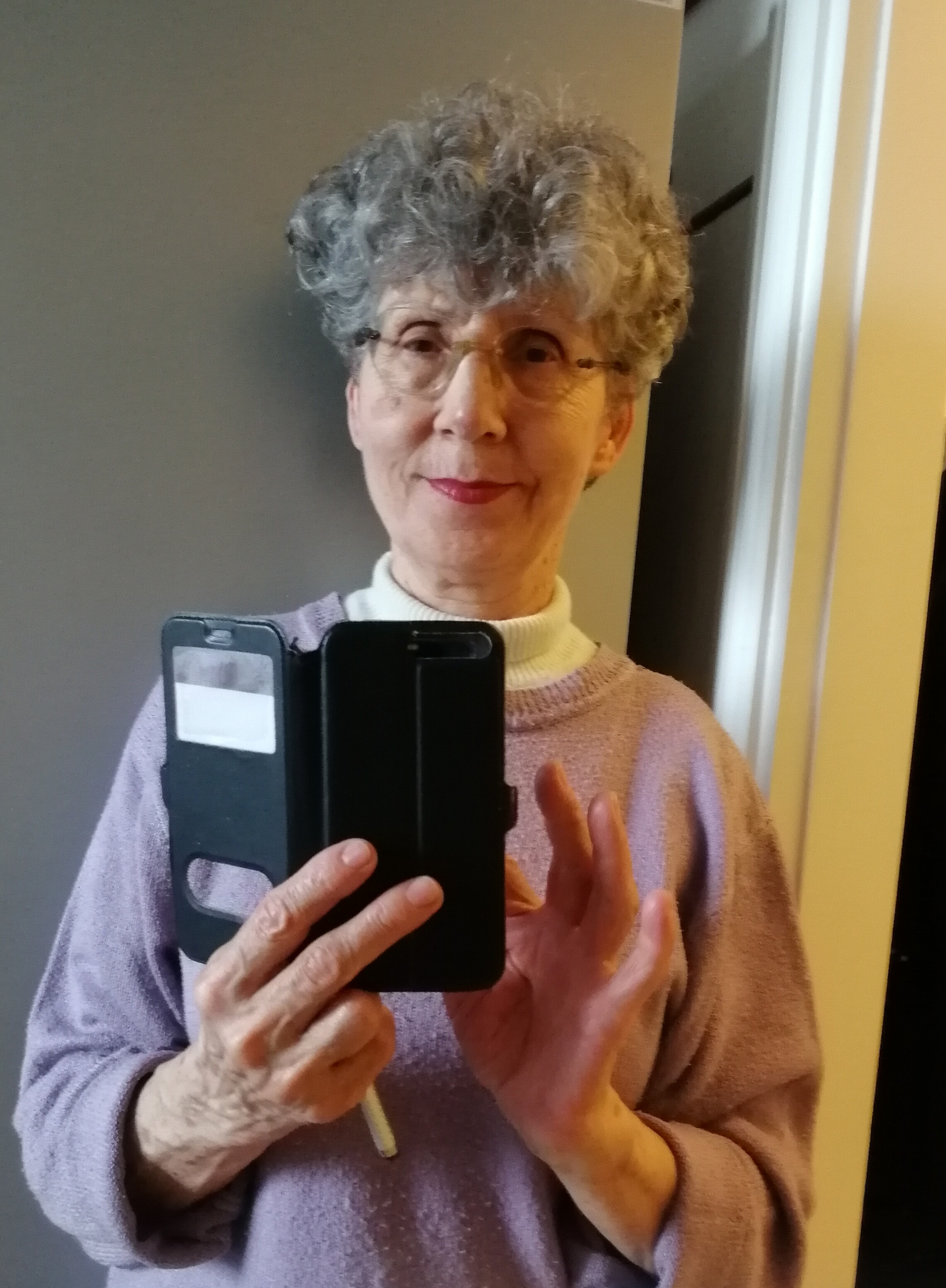 sua foto